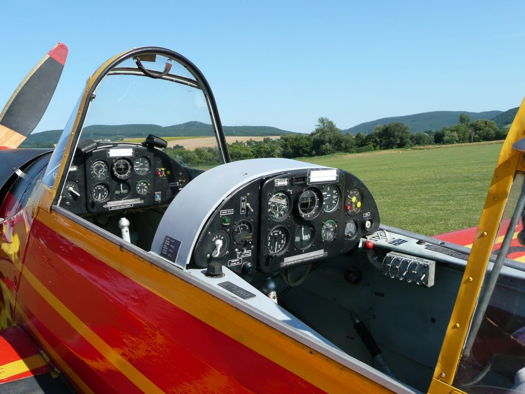 Kokpit lietadla Z-226M (OM-LLX)